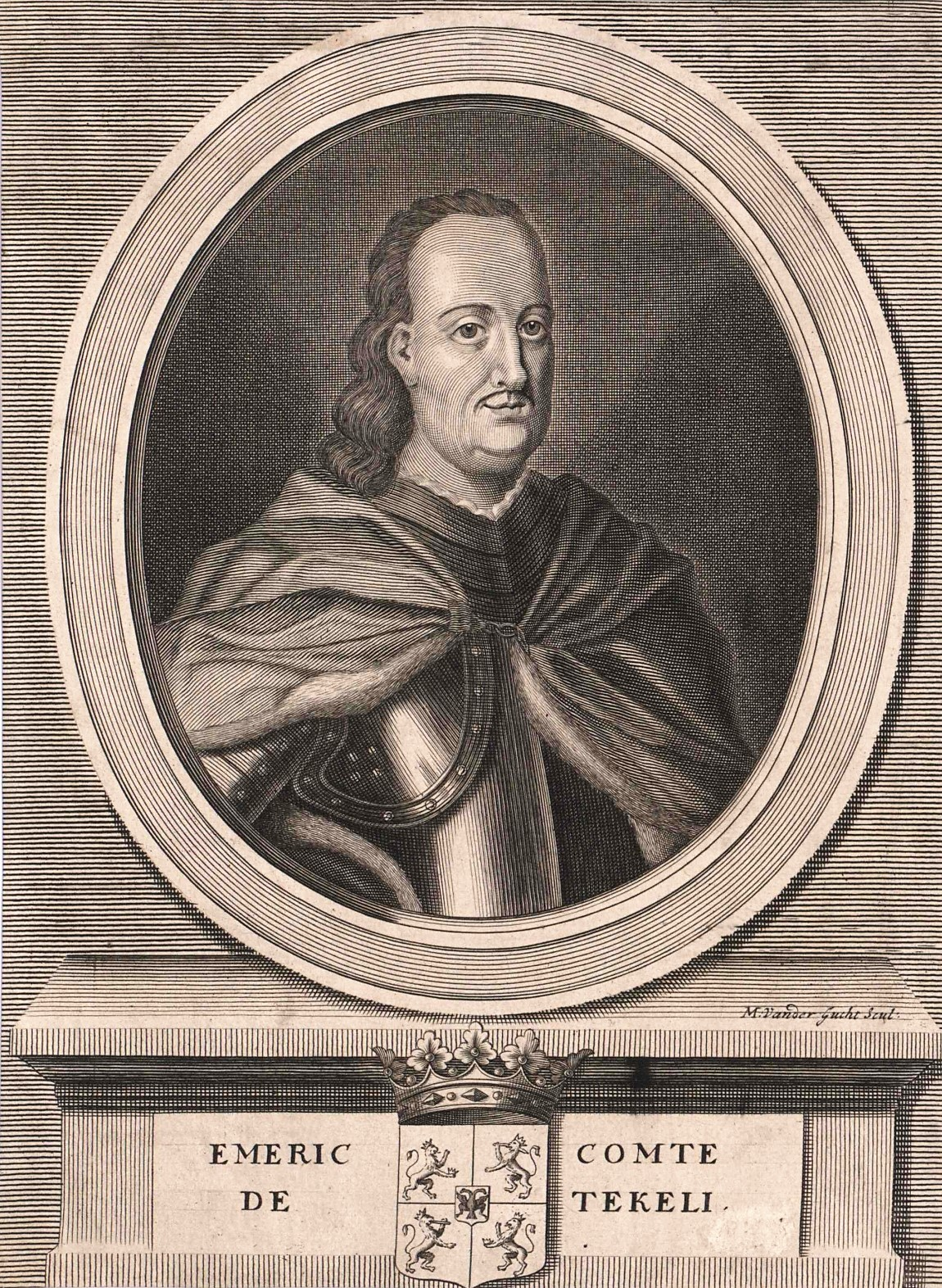 Tököly, Emmerich Graf (1657-1705)